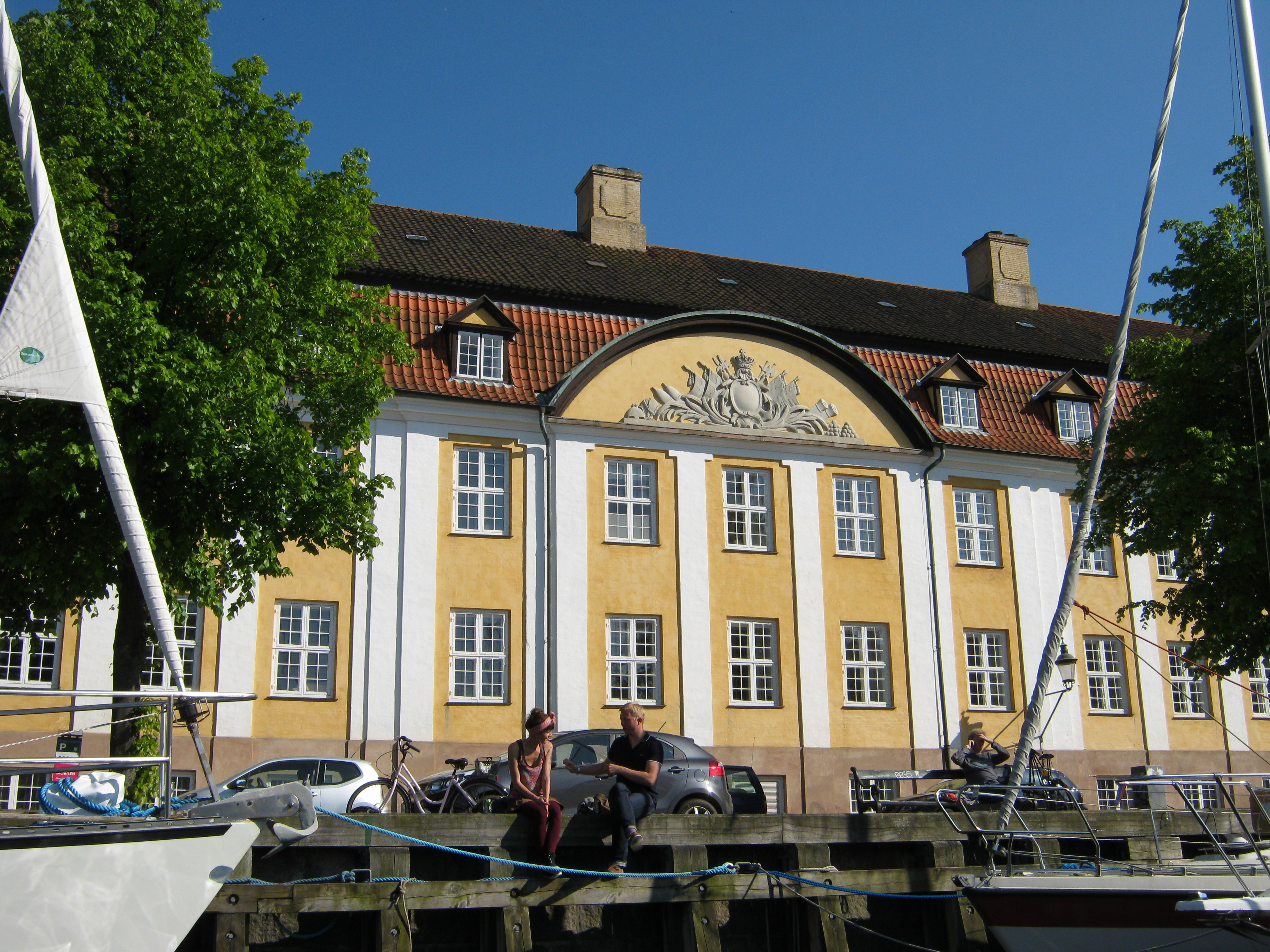 Søkvæsthuset in Christianshavn, Copenhagen, Denmark